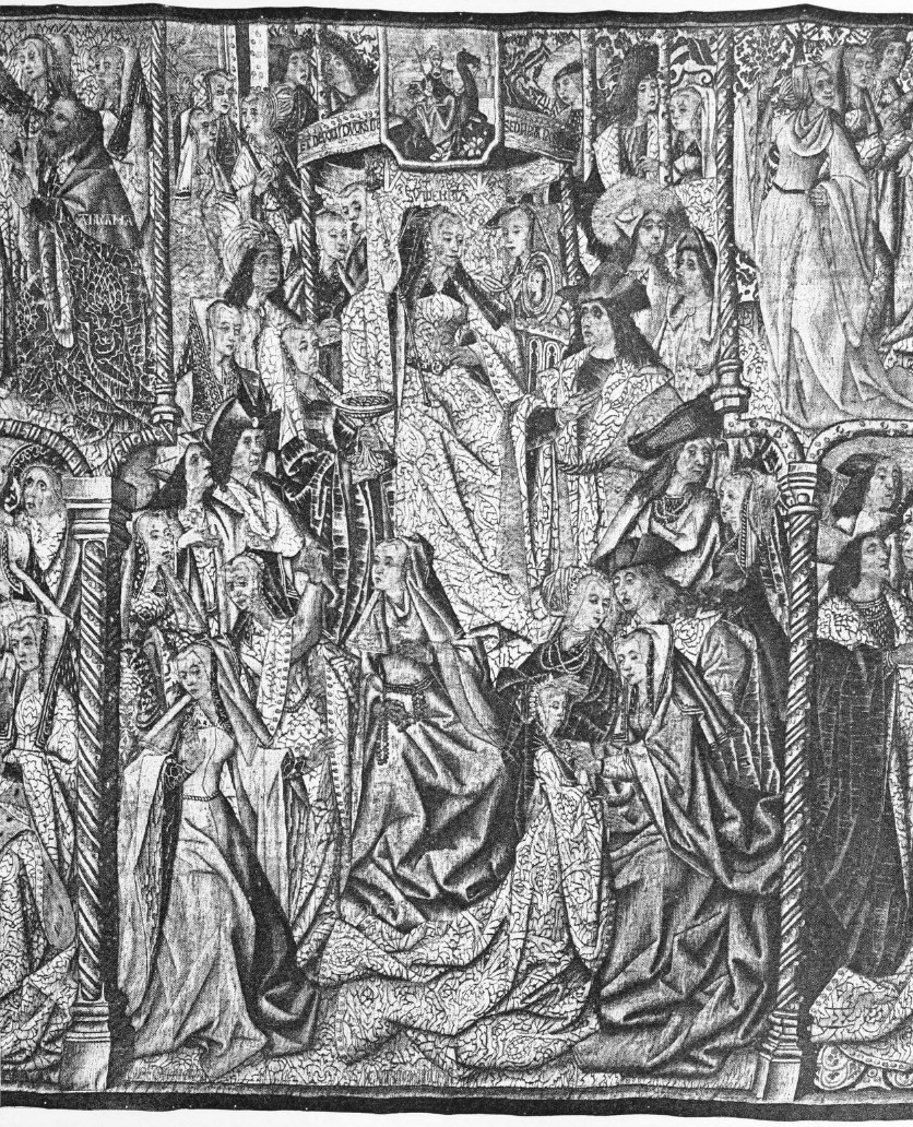 Detail einer Tapisserie im Schloss Cany, Cany-Barville, Seine-Maritime